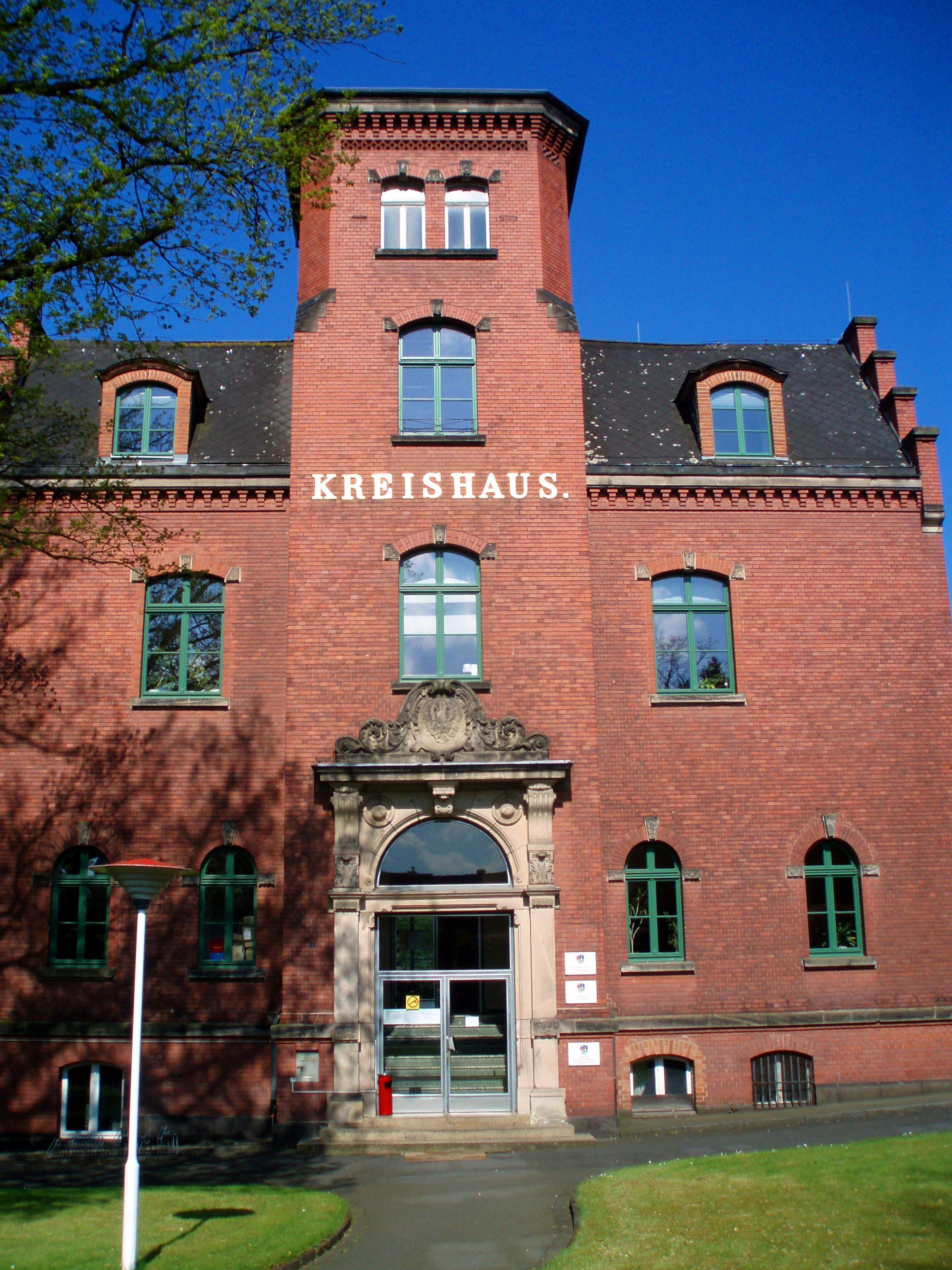 Witzenhausen: Gebäude der Kreisverwaltung des früheren Landkreises Witzenhausen, Bau aus der Gründerzeit nach dem deutsch-französischen Krieg 1870/71. 2015 Sitz einer Nebenstelle des Landkreises Werra-Meißner-Kreises.